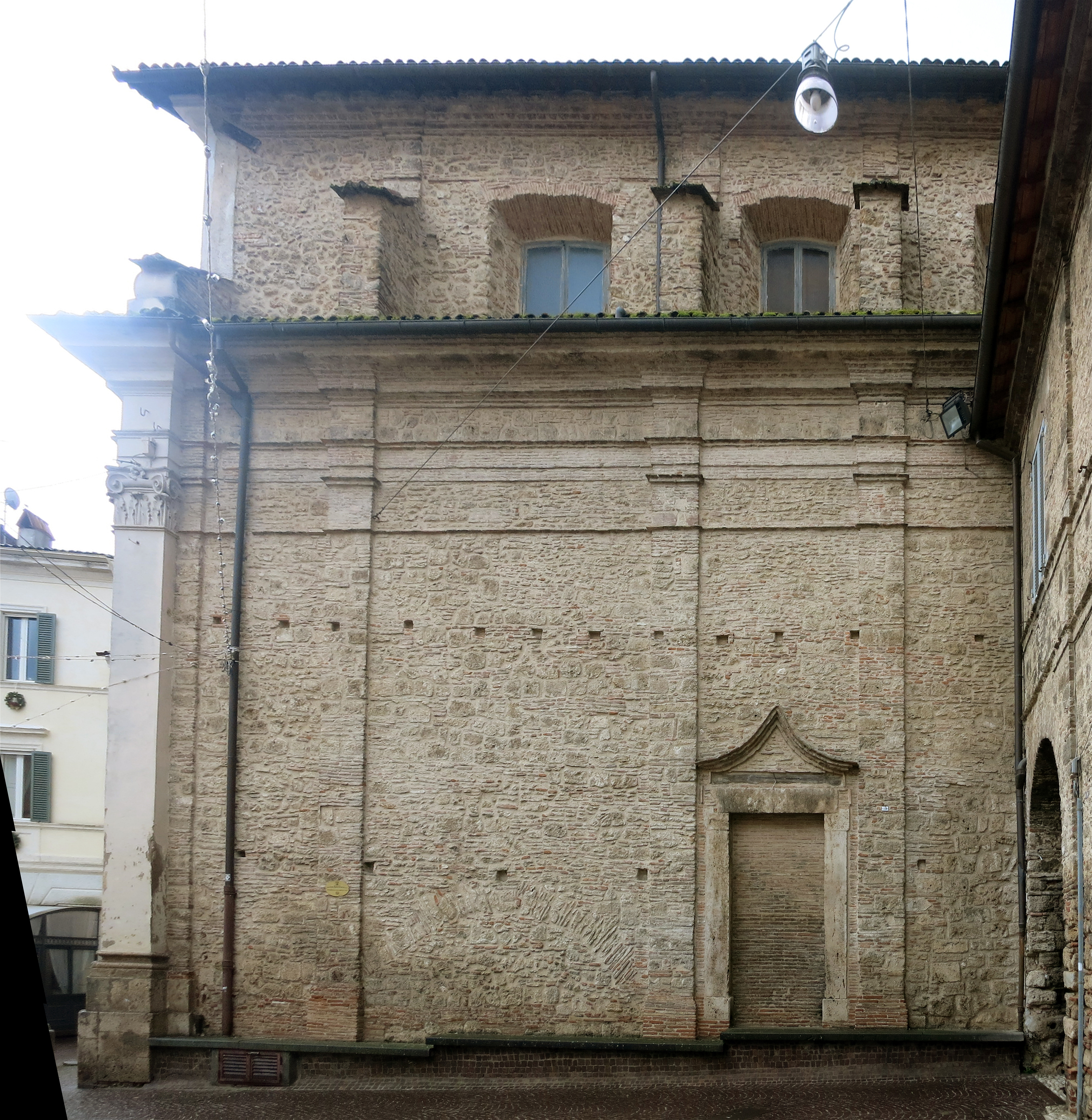 Chiesa di San Rufo - Rieti, Lazio